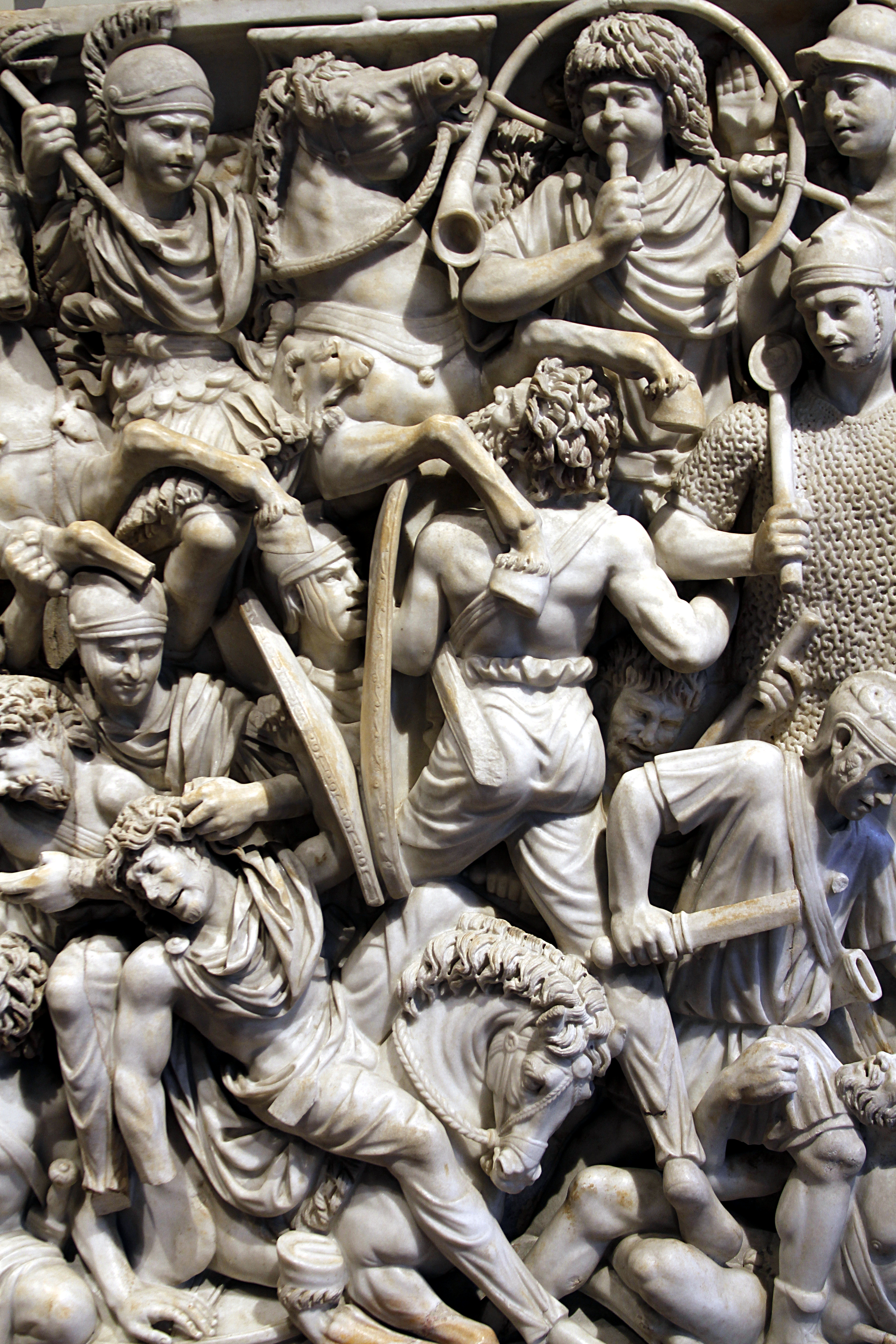 Palazzo Altemps - Rome